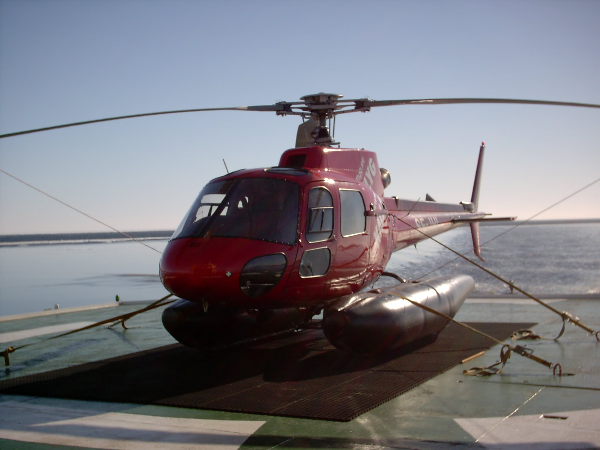 Helicopter on Ymer's helikopterpad